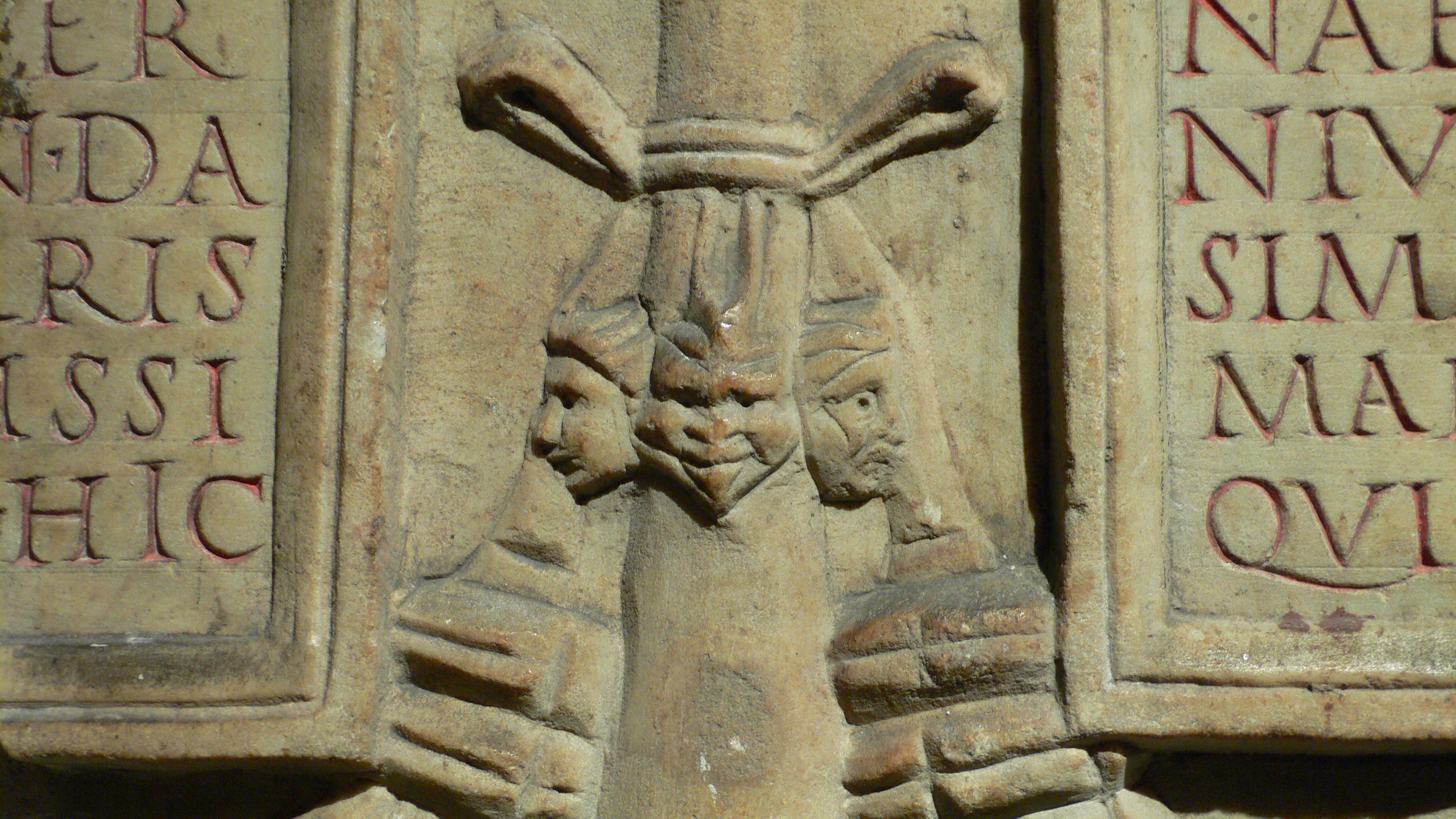 Épitaphe de Appia Zoe : détail du décor central